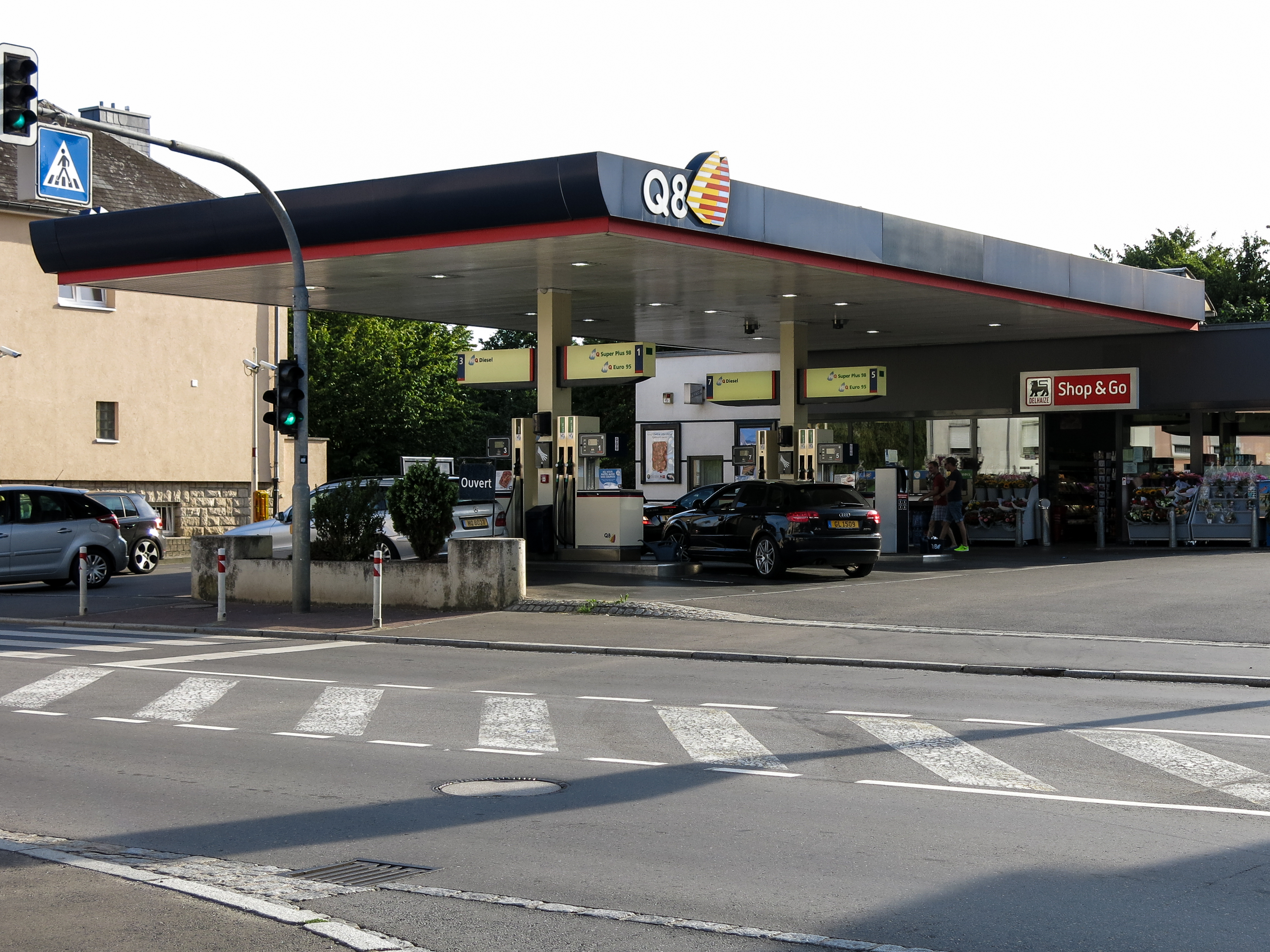 D'Q8 an der Diddenuewenerstrooss zu Hesper.